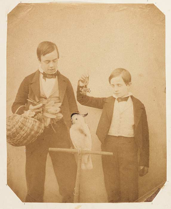 Teitl Cymraeg/Welsh title: Dau fachgen gyda chocatŵ wedi ei stwffio Nodyn/Note It is very likely that the boys are John Traherne Moggridge and Weston Moggridge, the sons of Fanny (nee Dillwyn) and Matthew Moggridge. Dyddiad/Date: 1853 Cyfeiriad/Reference: viv00009 (pb02376/01) Rhif cofnod / Record no.: 3590001 Rhagor o wybodaeth am Ffotograffiaeth Gynnar Abertawe yn Llyfrgell Genedlaethol Cymru More information about Early Swansea Photography at the National Library of Wales